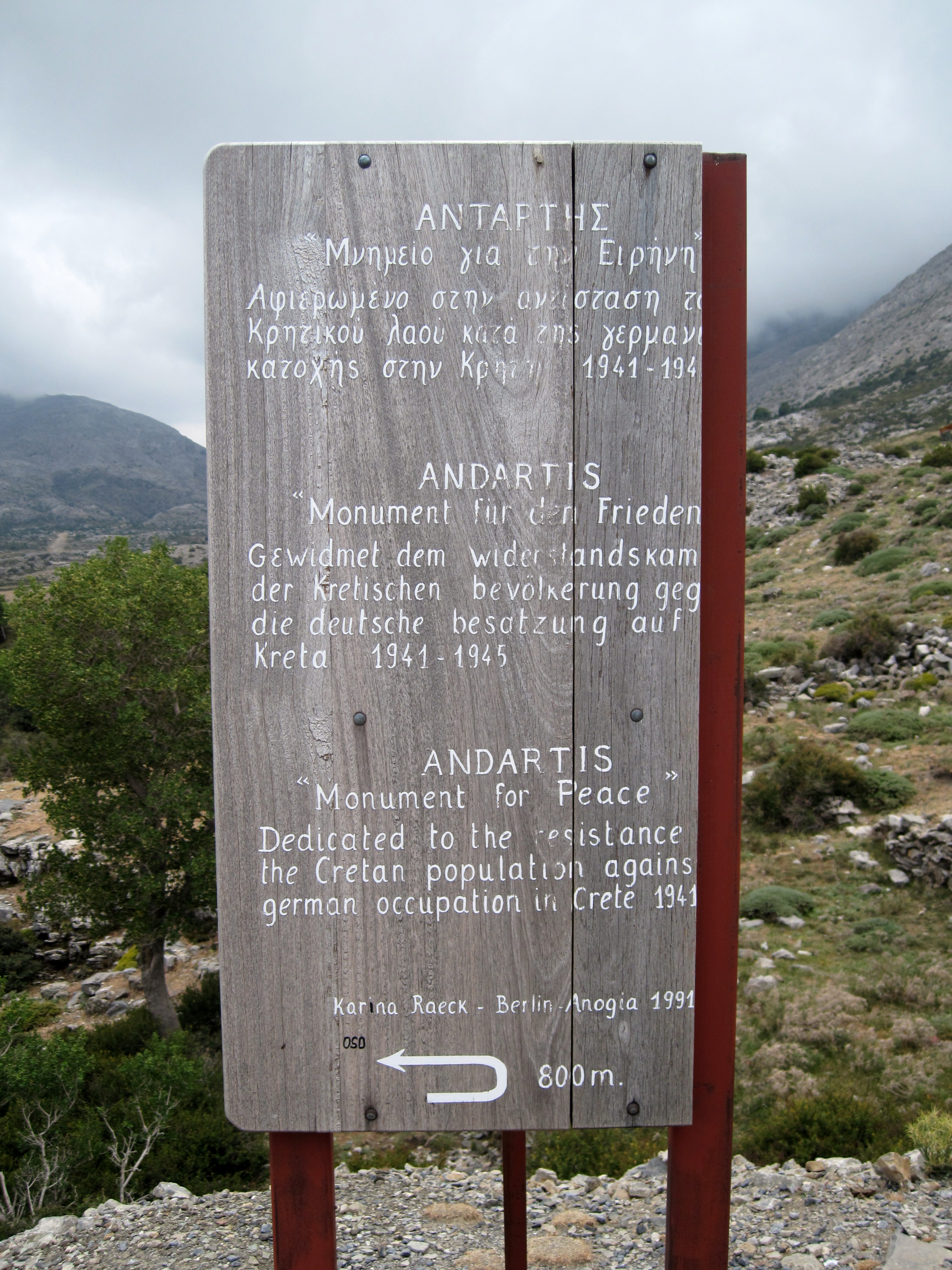 Hinweisschild zum Andartis-Denkmal auf der Nida-Hochebene, Gemeinde Anogia, Präfektur Rethymno, Kreta, Griechenland